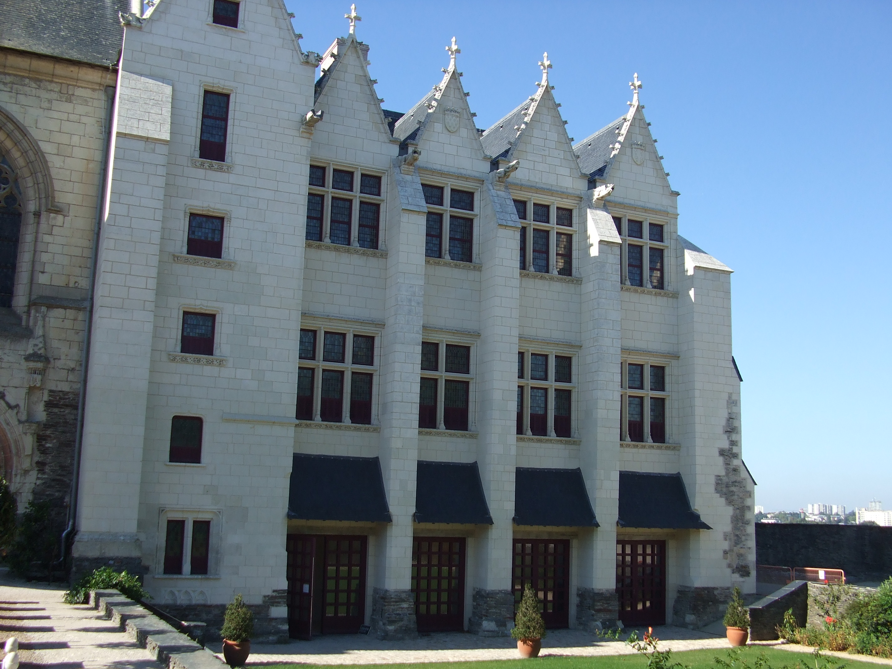 Château d'Angers - Galerie du roi René